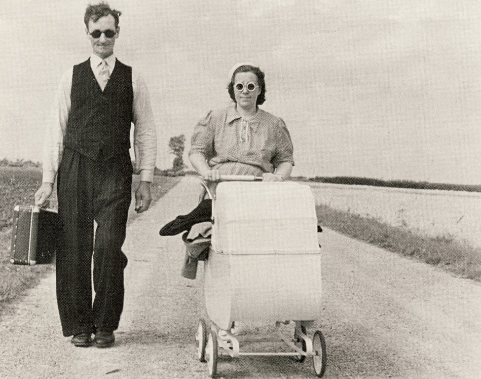 Semesterbild av Gunnar Lundh, Sverige